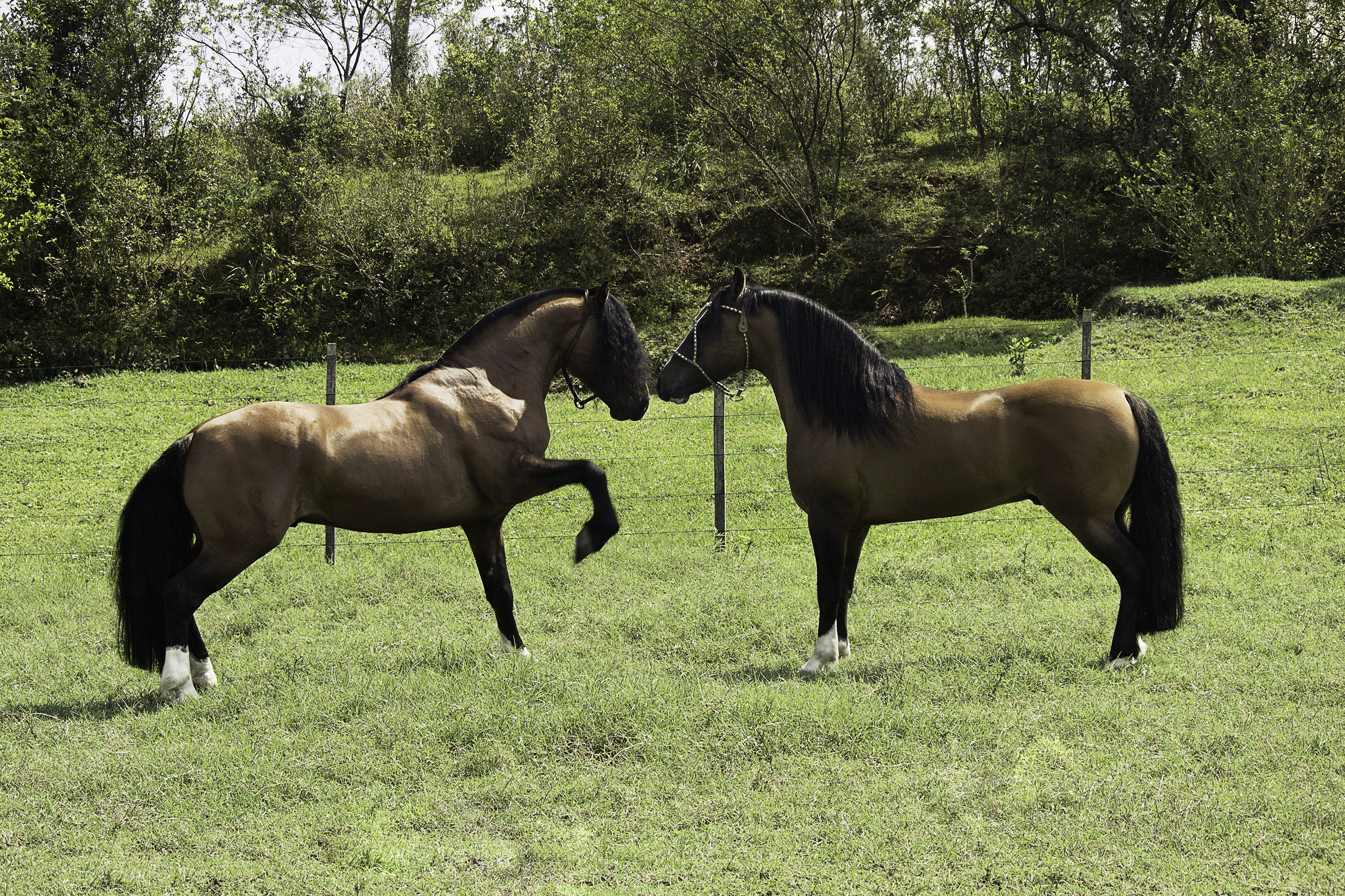 Assuero do Rancho Aruanã e Hermosso do Topo da Serra, garanhões premiados e reconhecidos na raça Crioula. Fotografia na cabanha proprietária, localizada no Rio Grande do Sul.